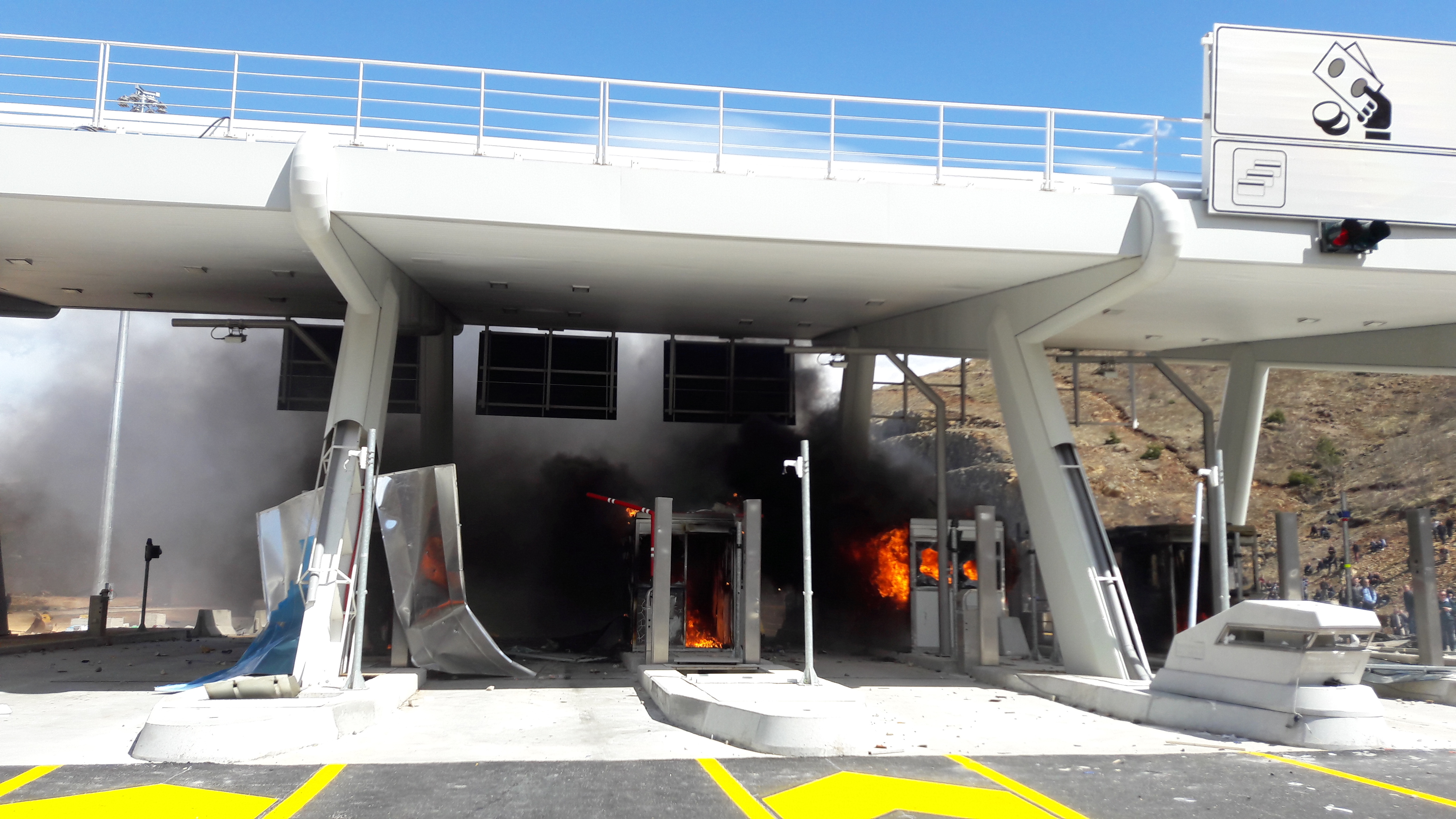 Thyerja e trarit të Kalimashit, mars 2018